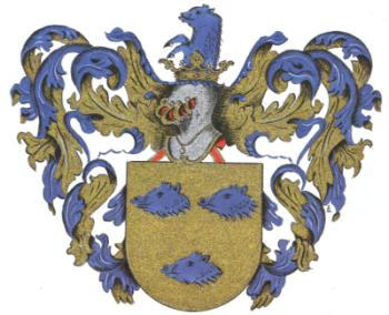 het wapenschild van Wommelgem